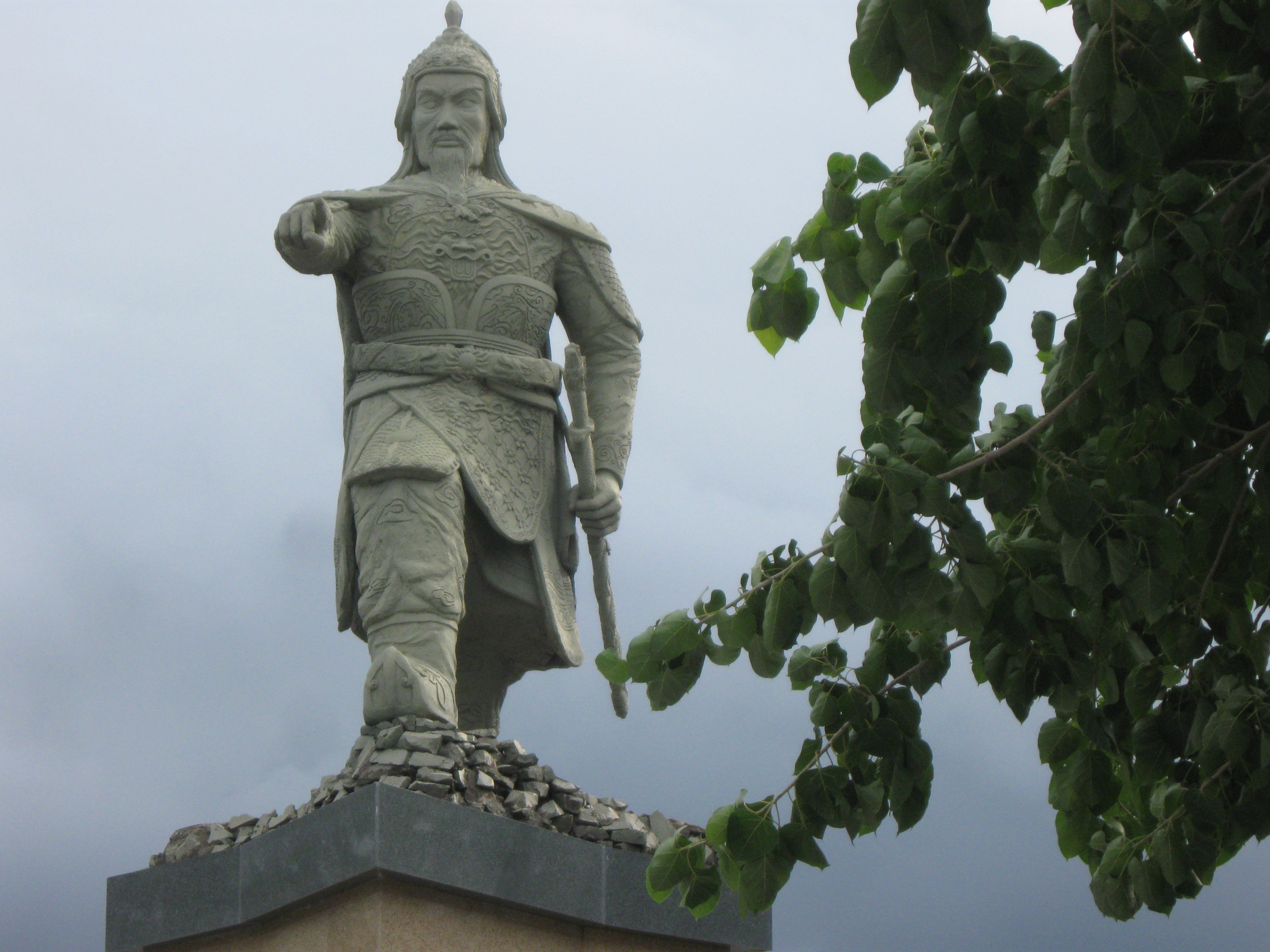 Чан Хынг Дао (вьетн. Trần Hưng Đạo; настоящее имя Чан Куок Туан (Trần Quốc Tuấn); также известен как Хынг Дао выонг (Hưng Đạo Vương, «король Хынг Дао»)) — вьетский главнокомандующий, организовавший успешную оборону страны во время третьего монгольского вторжения в Дайвьет в 1287—1288 годах. Автор теоретических трудов по военному делу.